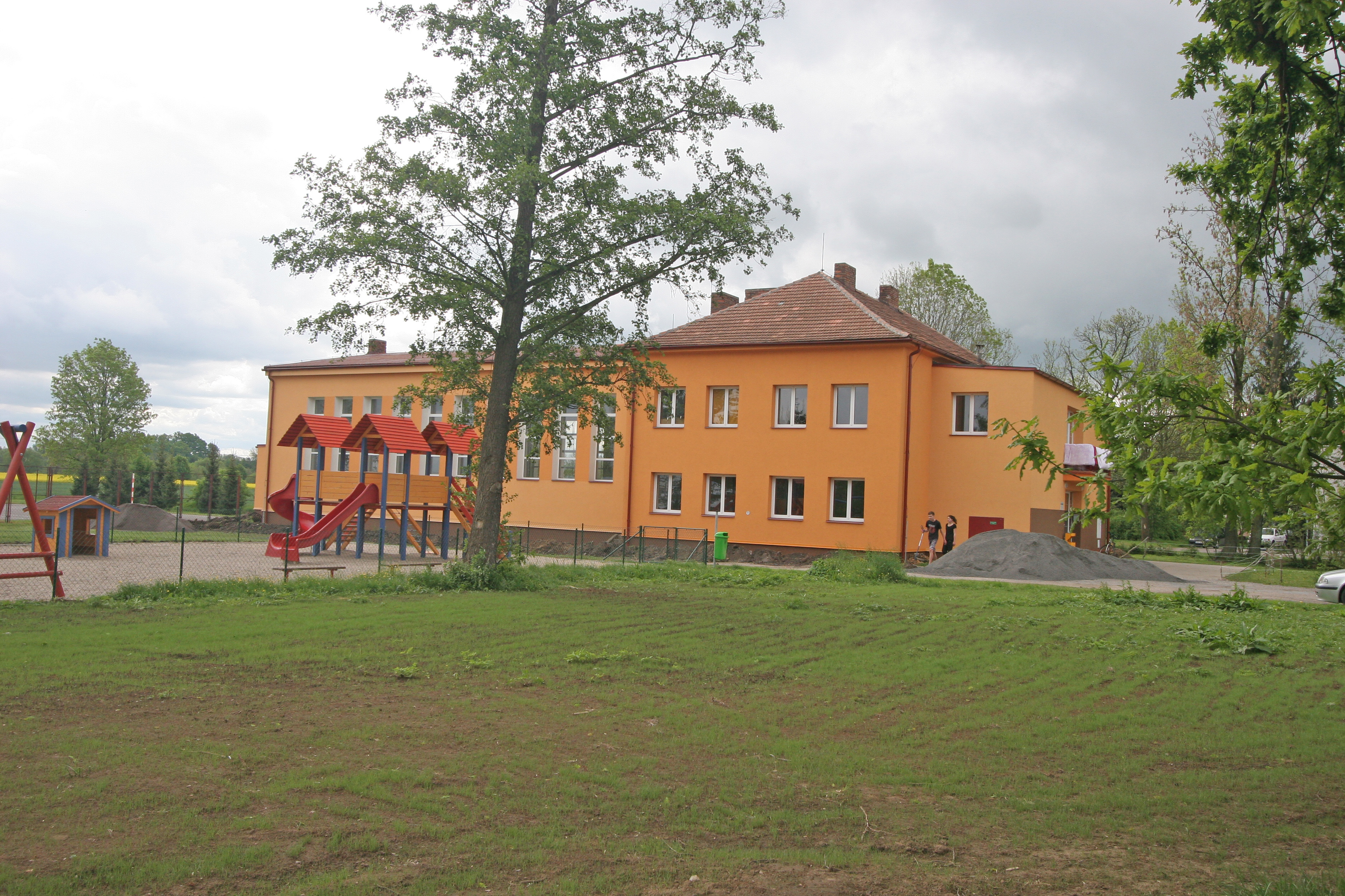 Tuněchody sokolovna